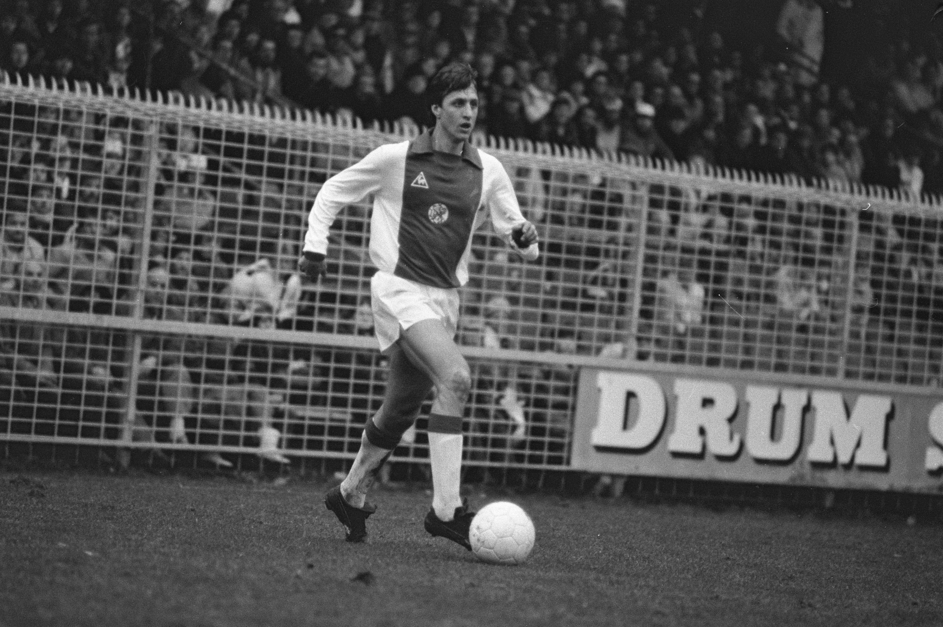 Collectie / Archief : Fotocollectie Anefo Reportage / Serie : Ajax tegen Haarlem 4-1 met Johan Cruyff Beschrijving : Cruijff met de bal Datum : 6 december 1981 Locatie : Amsterdam, Noord-Holland Trefwoorden : sport, voetbal, voetballers Persoonsnaam : Cruijff, Johan Fotograaf : Bogaerts, Rob / Anefo Auteursrechthebbende : Nationaal Archief Materiaalsoort : Negatief (zwart/wit) Nummer archiefinventaris : bekijk toegang 2.24.01.05 Bestanddeelnummer : 931-8444